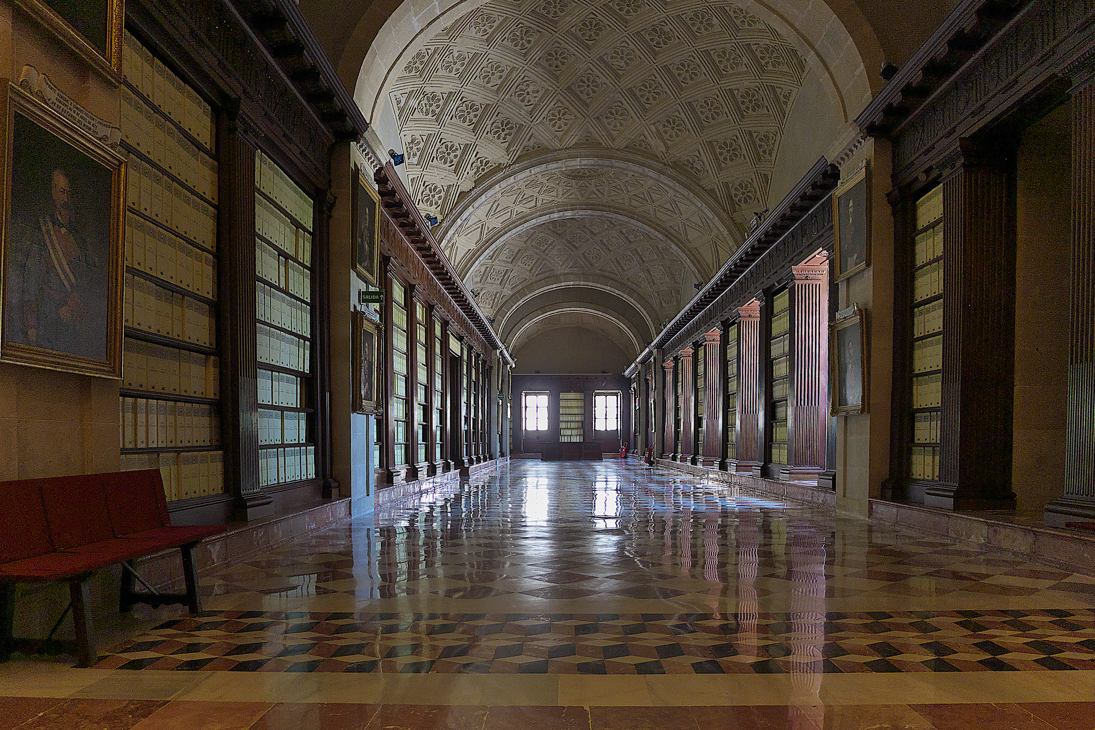 Galería. Miguel de Zumárraga (1599) diseña las bóvedas del edificio, incumpliendo las trazas de Juan de Herrera, que fueron proyectadas, planas y de madera. En el año 1785, el superintendente Antonio de Lara y Zúñiga y el arquitecto Lucas Cintora y Aréjula modifican la galería de la planta alta eliminando los muros de sustentación de las bóvedas, para conseguir diafanidad.